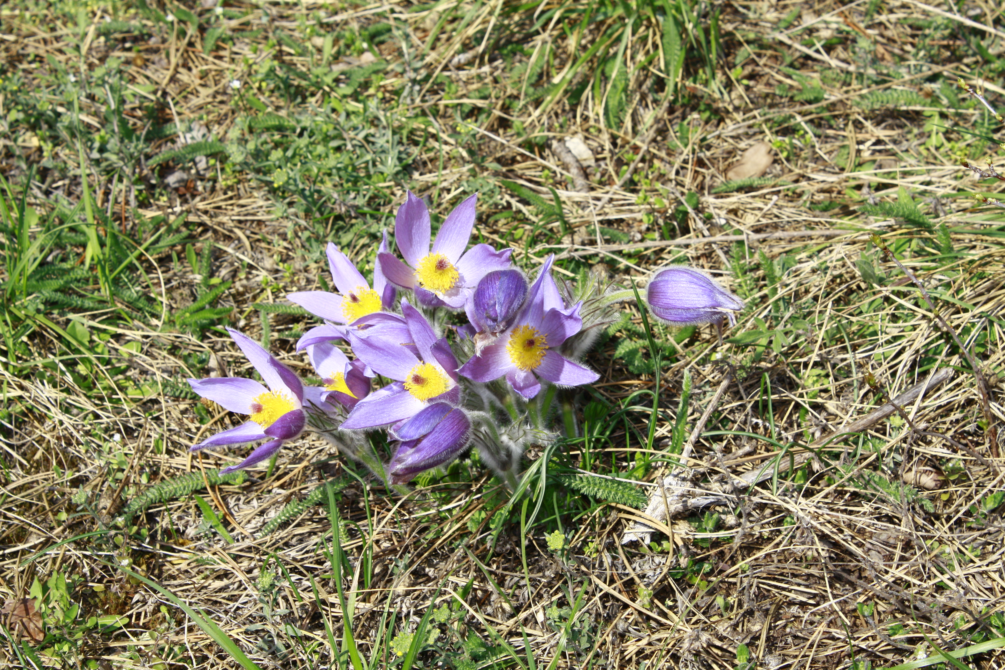 Große Kuhschelle (Pulsatilla grandis im Naturpark Föhrenberge südlich von Wien